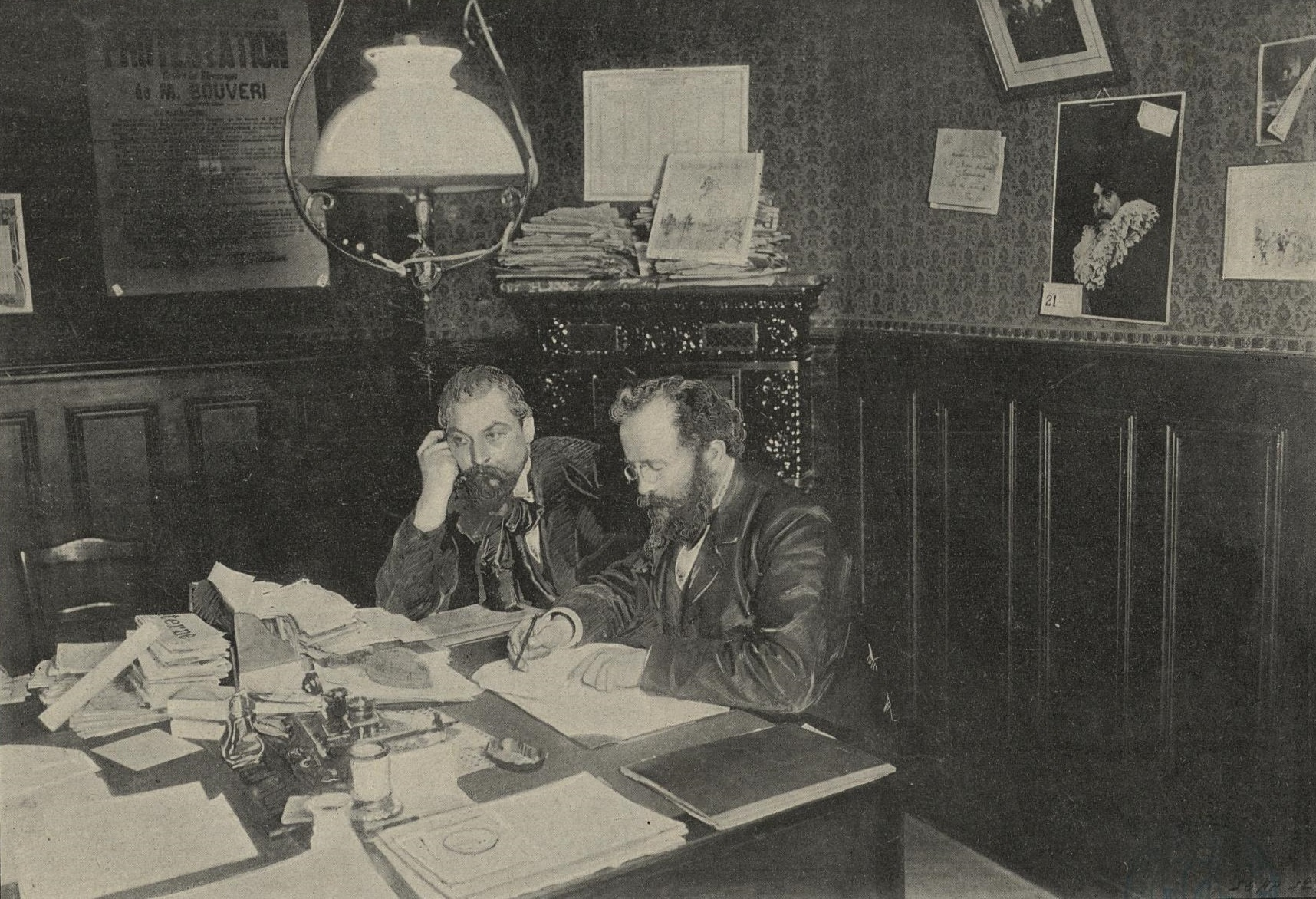 "M. Lenoir [sic], secrétaire général de la nouvelle Bourse indépendante du Travail, et M. Biétri [sic], secrétaire adjoint".